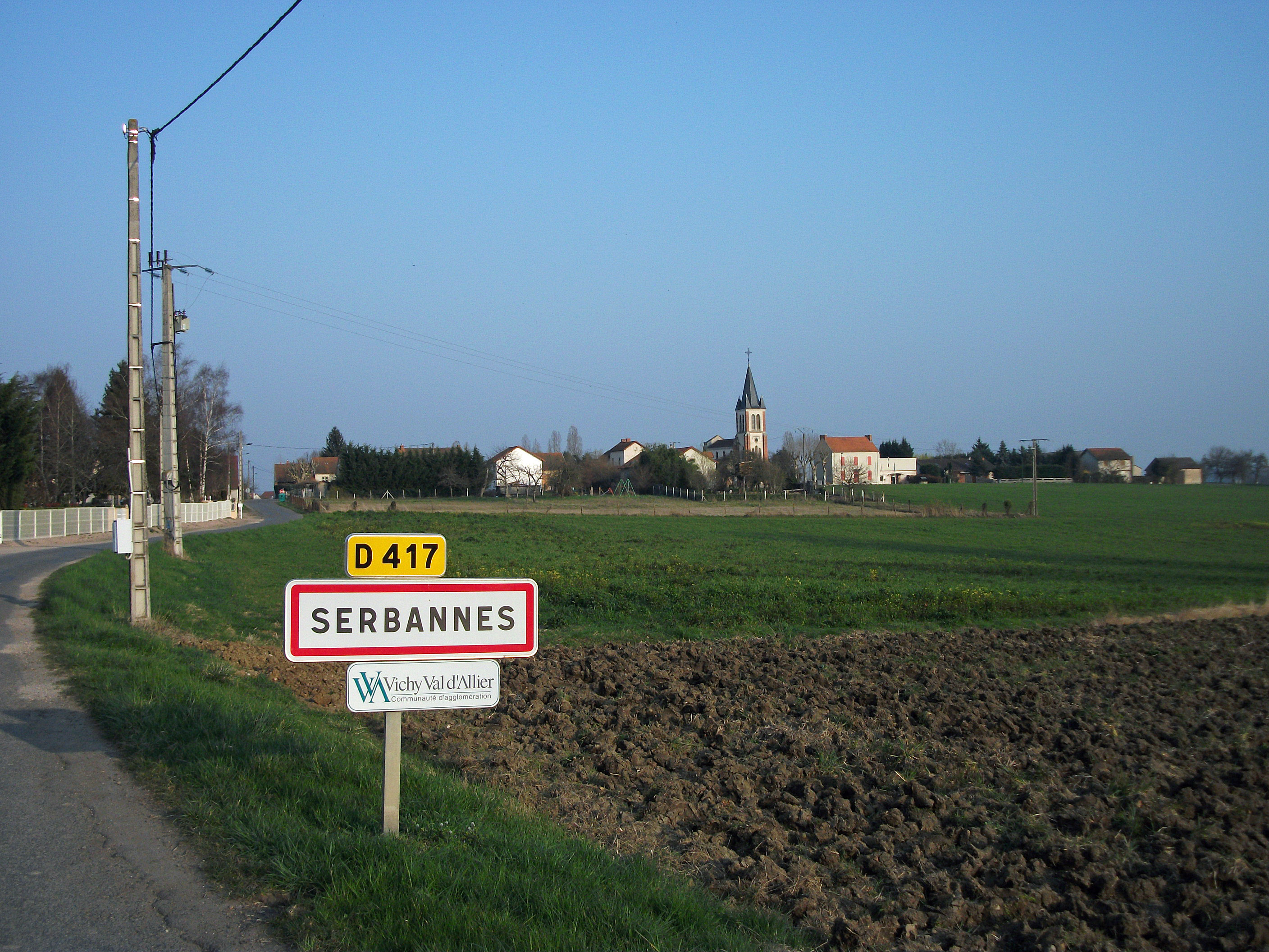 Entrée de Serbannes par la D 417 le 12 mars 2014. Panneau d'entrée d'agglomération justifiant son entrée, datant de 2011.